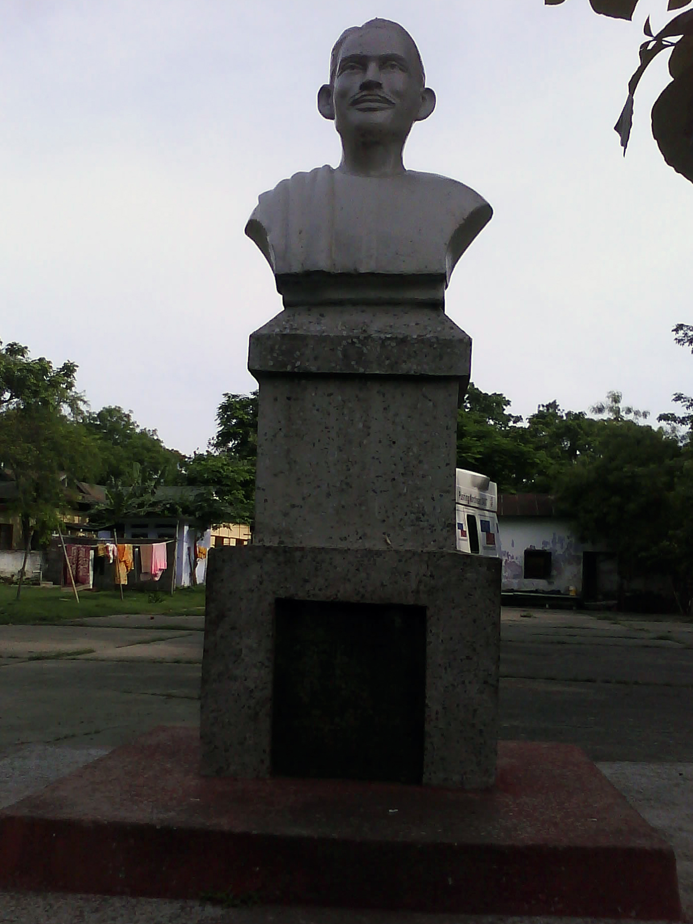 অসমীয়া: তেজপুৰ সাহিত্য সভা ভৱনৰ সম্মুখত থকা ব্ৰজনাথ শৰ্মাৰ আবক্ষ মূৰ্তি। ব্ৰজনাথ শৰ্মা (১৮৯৪ – ১৯৬০) এজন অভিনেতা, নাট্যকাৰ আৰু অসমৰ ভ্ৰাম্যমান নাটকৰ জনক আছিল। অসমত সহ-অভিনয়ৰ বাটকটীয়া।